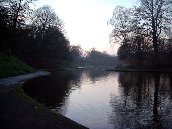 Eastville Park lake in Eastville, Bristol